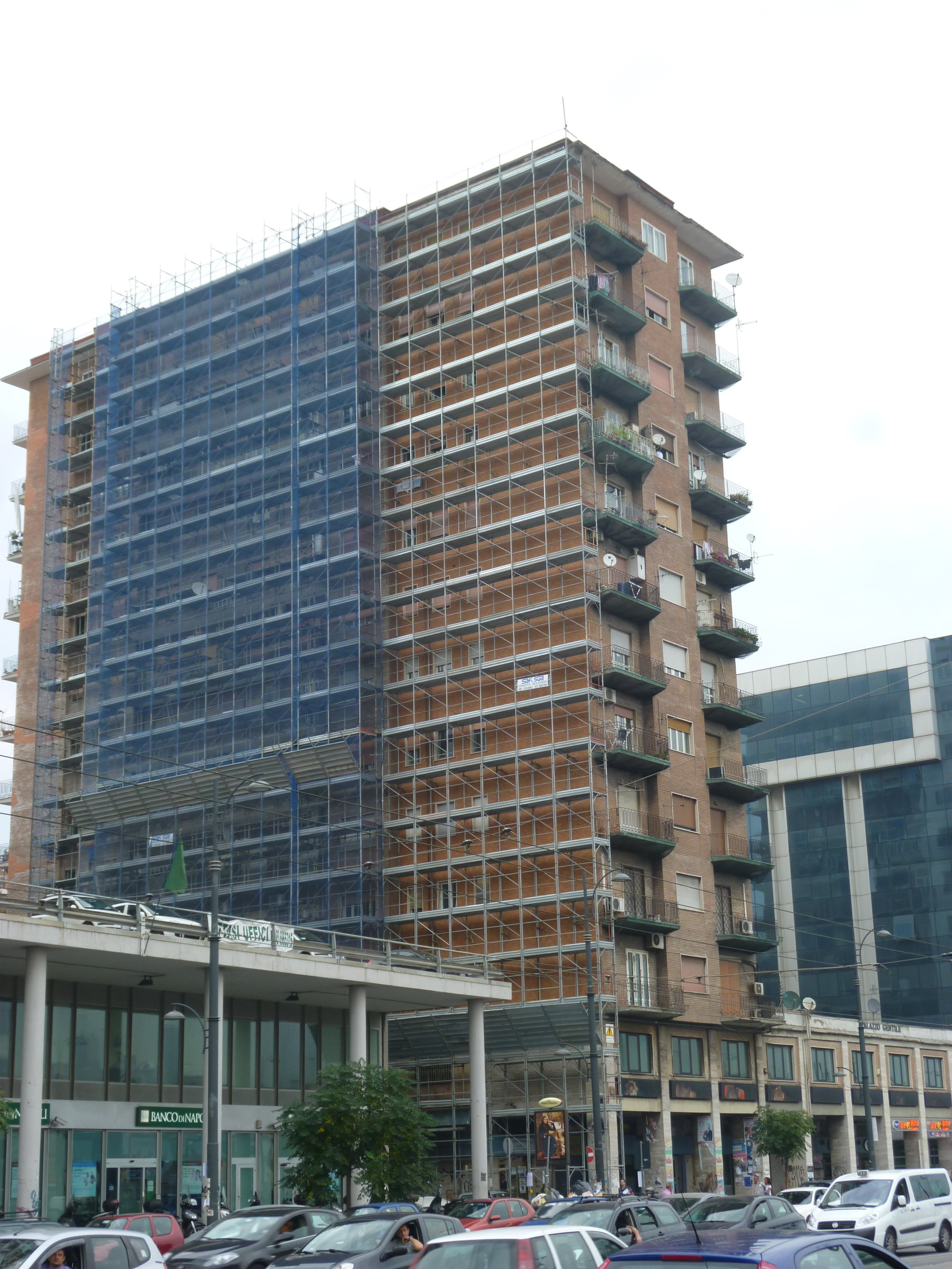 Napoli